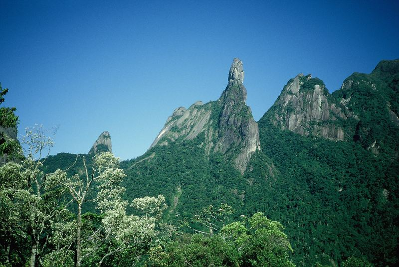 Berg in Brasilien, Rio de Janeiro, Teresópolis